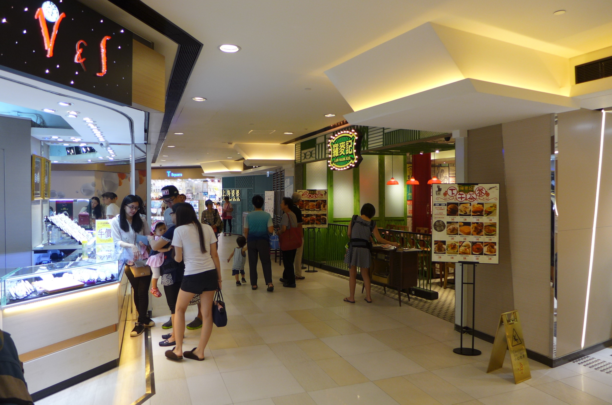 Aberdeen Centre Ac4 interior